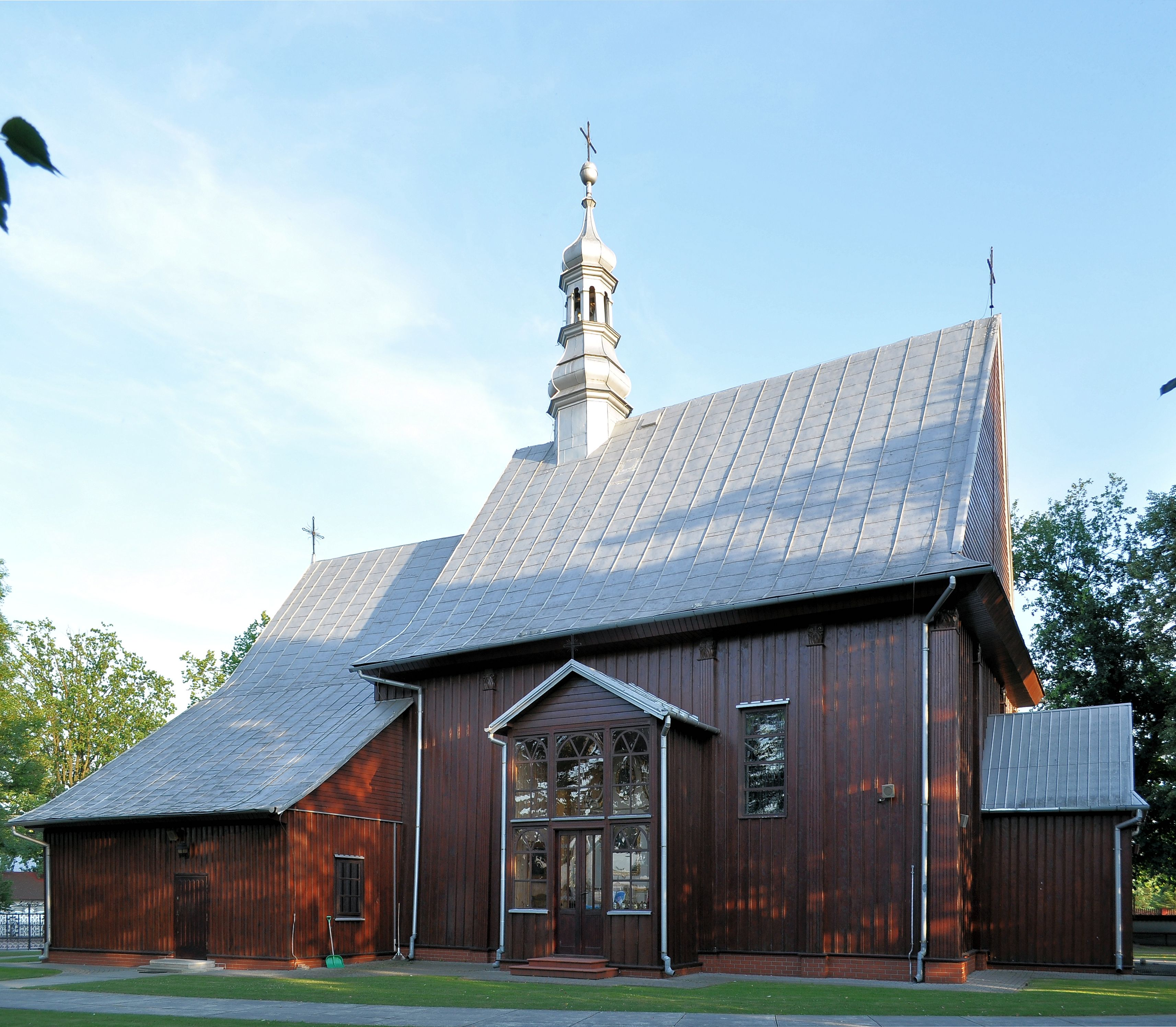 kościół świętego Mikołaja Biskupa w Zgórsku